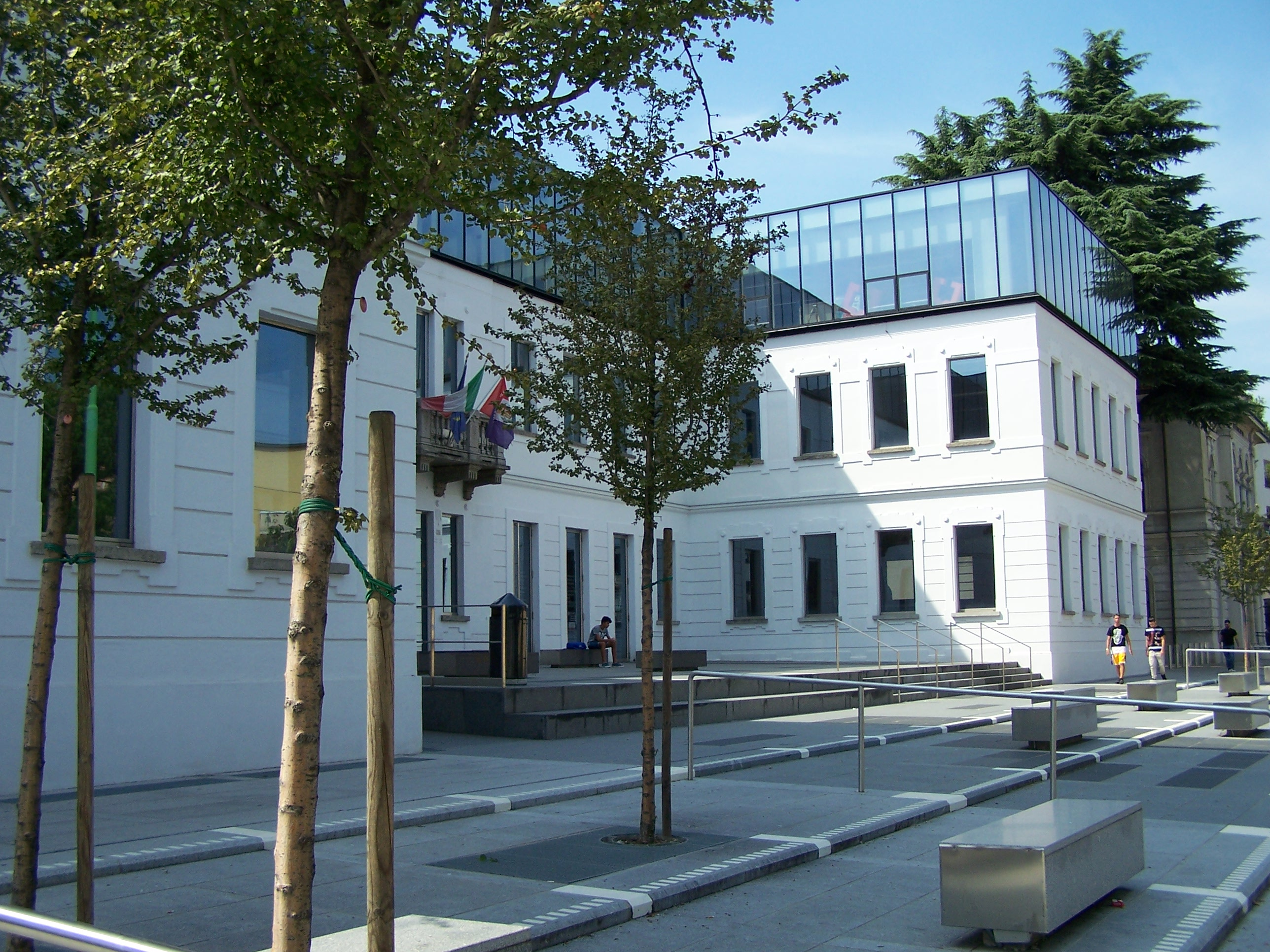 Il Pertini - Biblioteca Comunale (solo esterni) This is a photo of a monument which is part of cultural heritage of Italy.